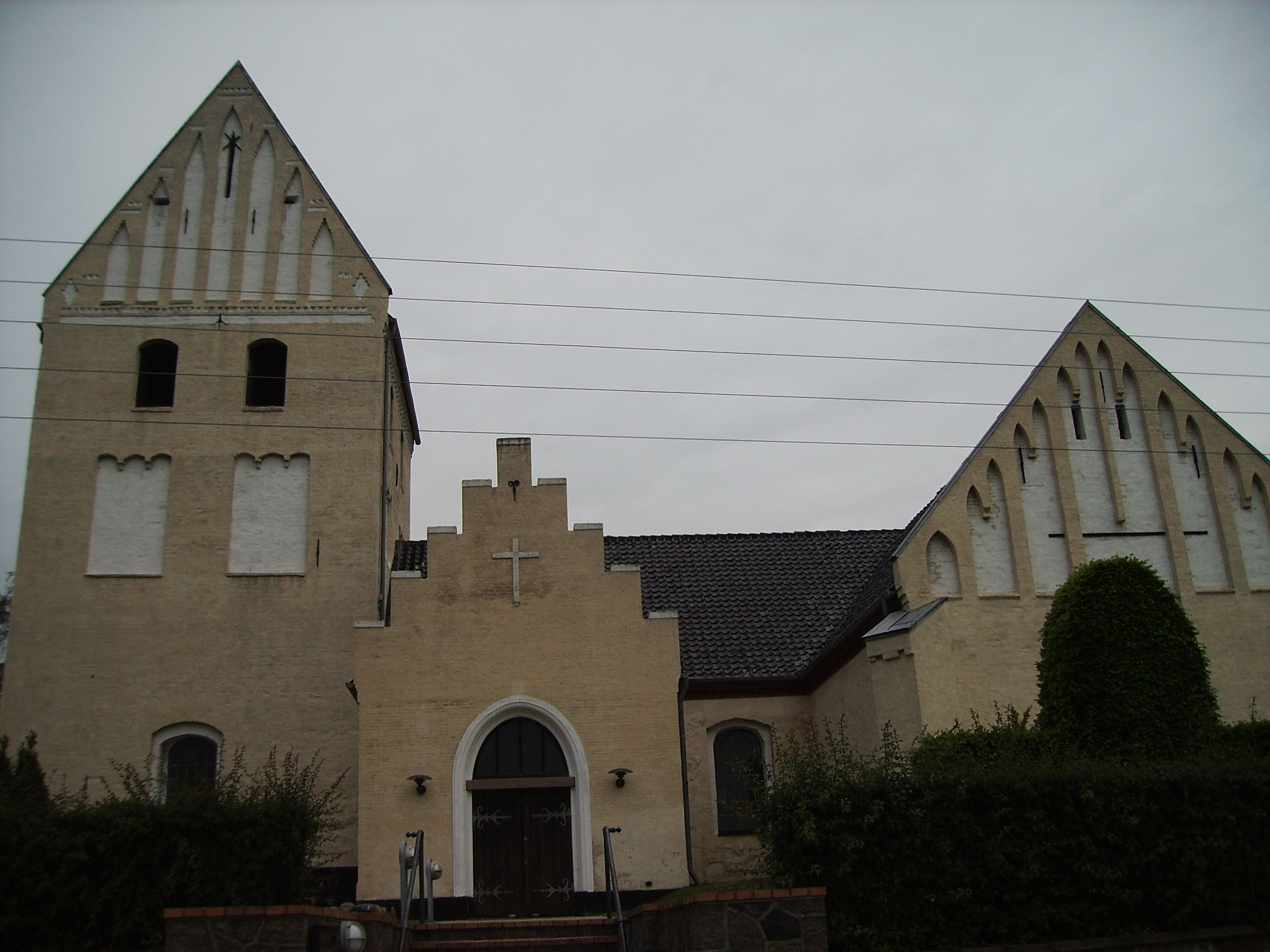 Sønderby Kirke, Sønderby Sogn, Båg Herred, Odense Amt, Danmark - Sønderby Kirke fra syd